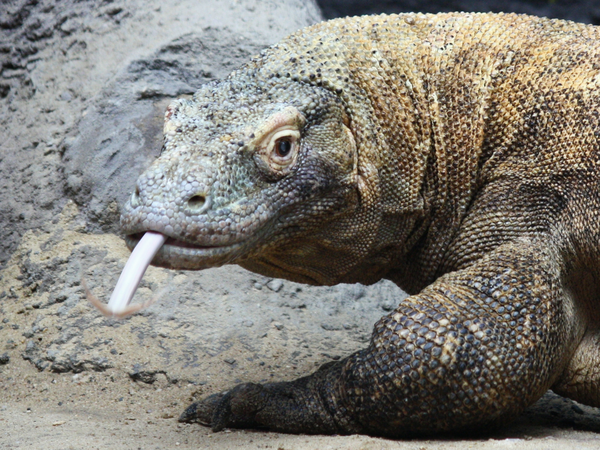 Varan komodský v Pražské Zoo